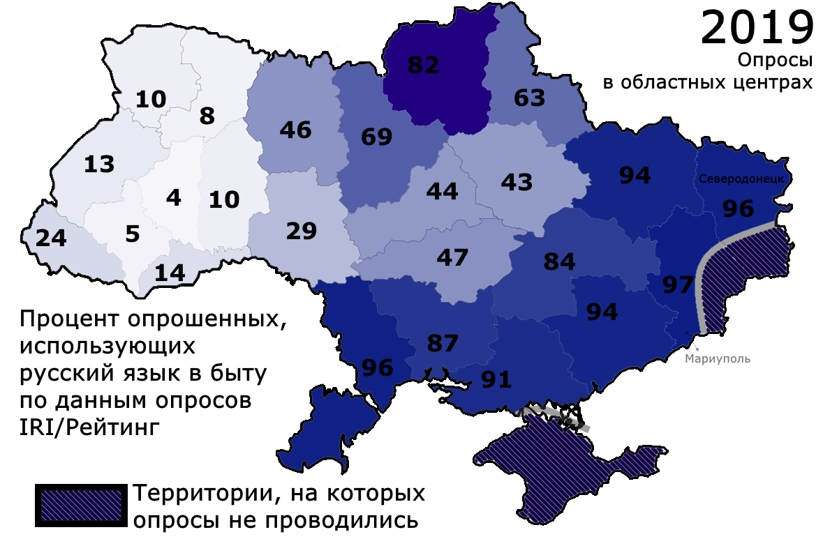 Данные опросов по использованию русского языка в быту на Украине в 2019 году.